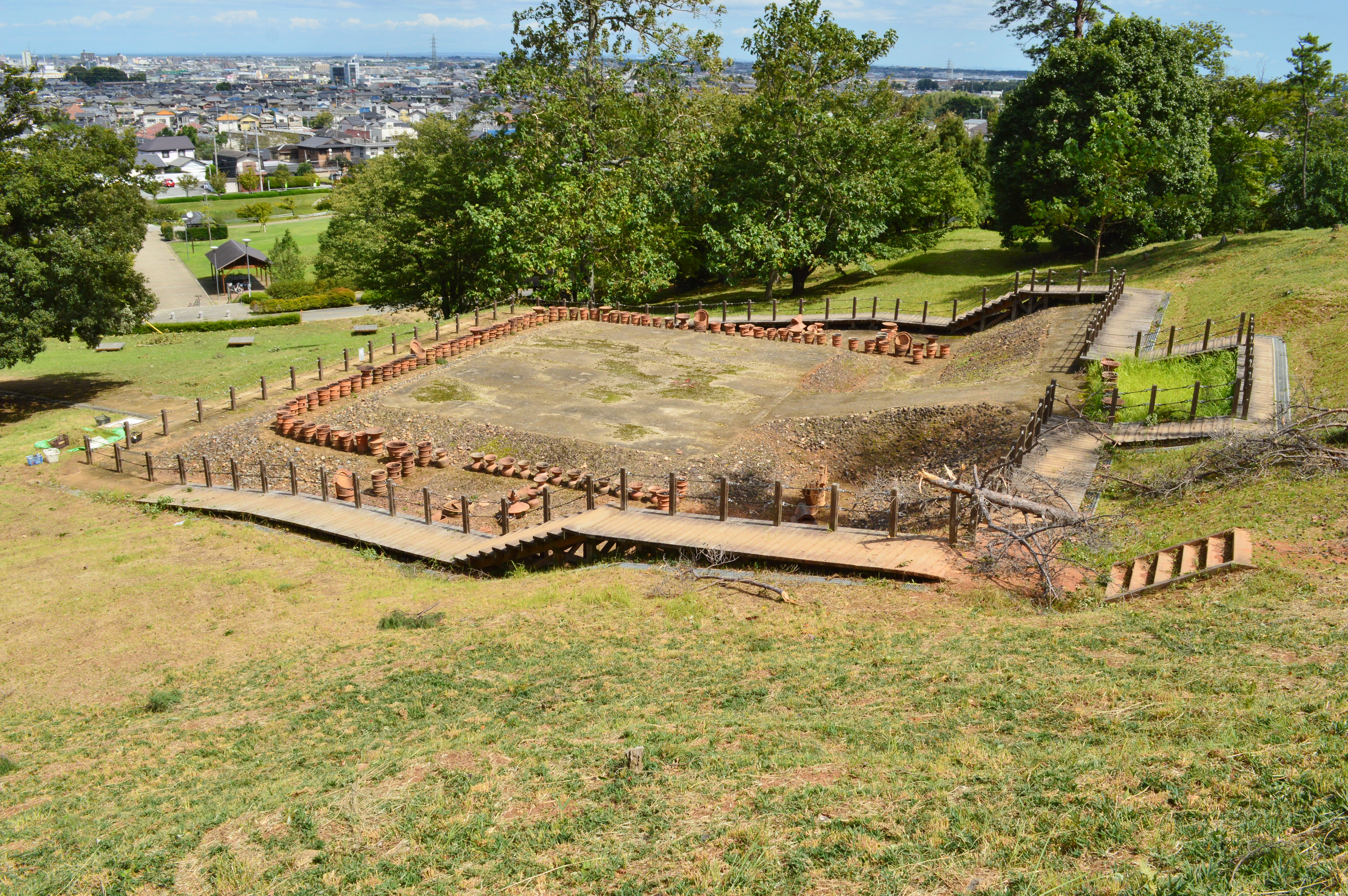 宝塚1号墳 出島状施設全景